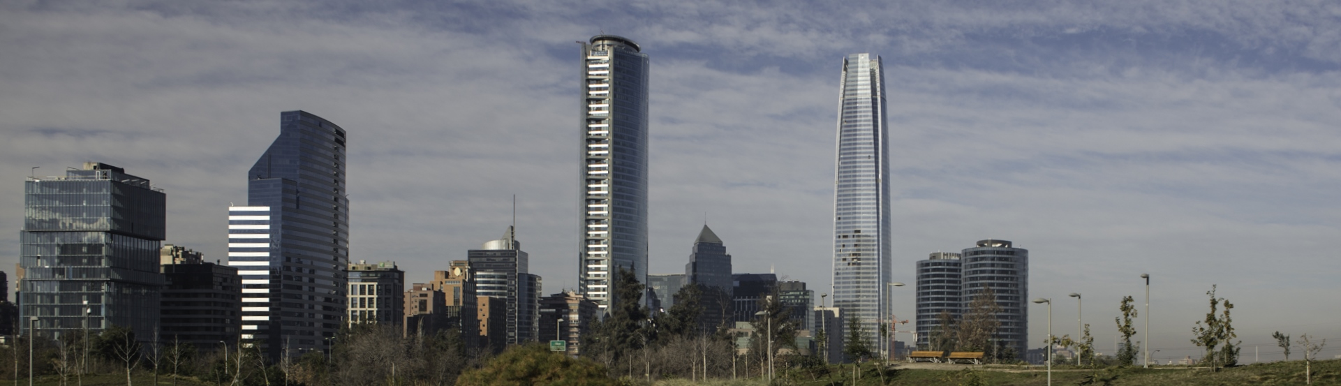 vista del sector conocido como Sanhattan desde el Parque Bicentenario en Vitacura, Santiago, Region Metropolitana, Chile